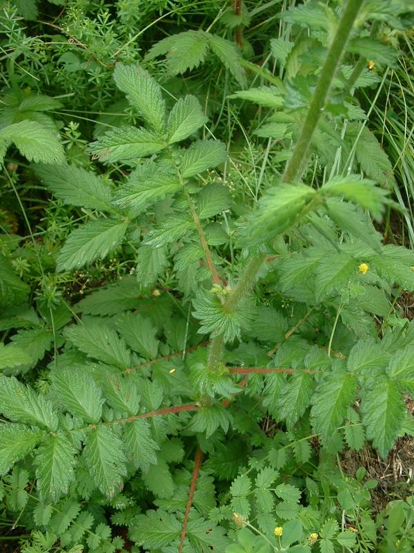 Aigremoine eupatoire (Feuilles), Vantoux-et-Longevelle, juillet 2004